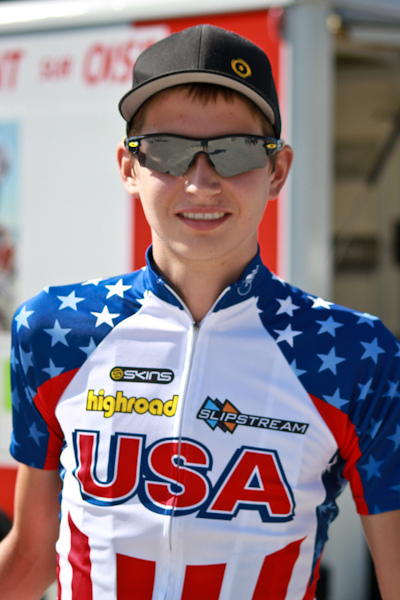 Joe Dombrowski